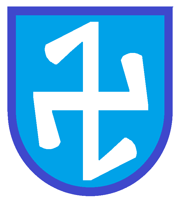 Герб "Проскури"